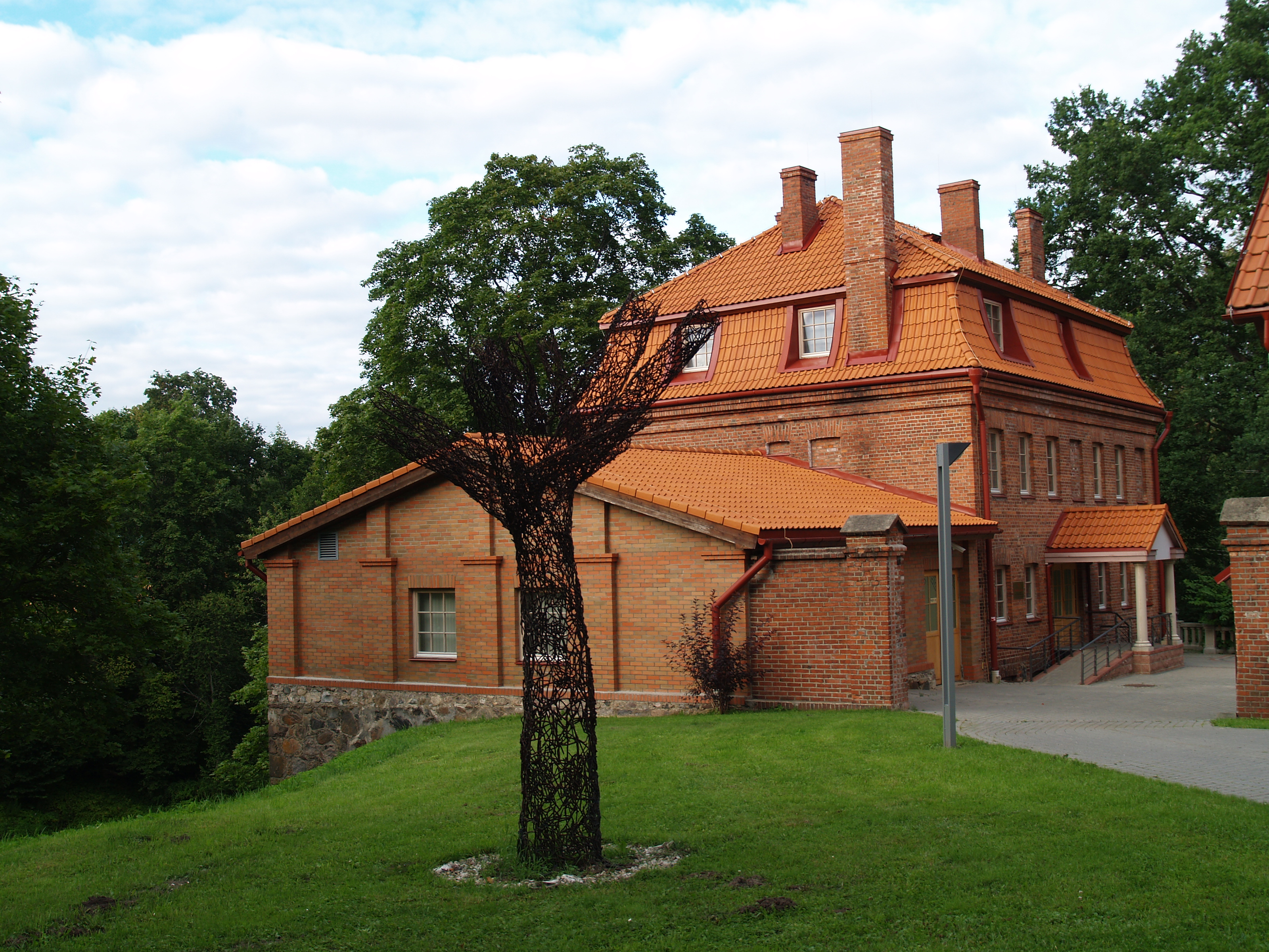 Valmiera muuseum